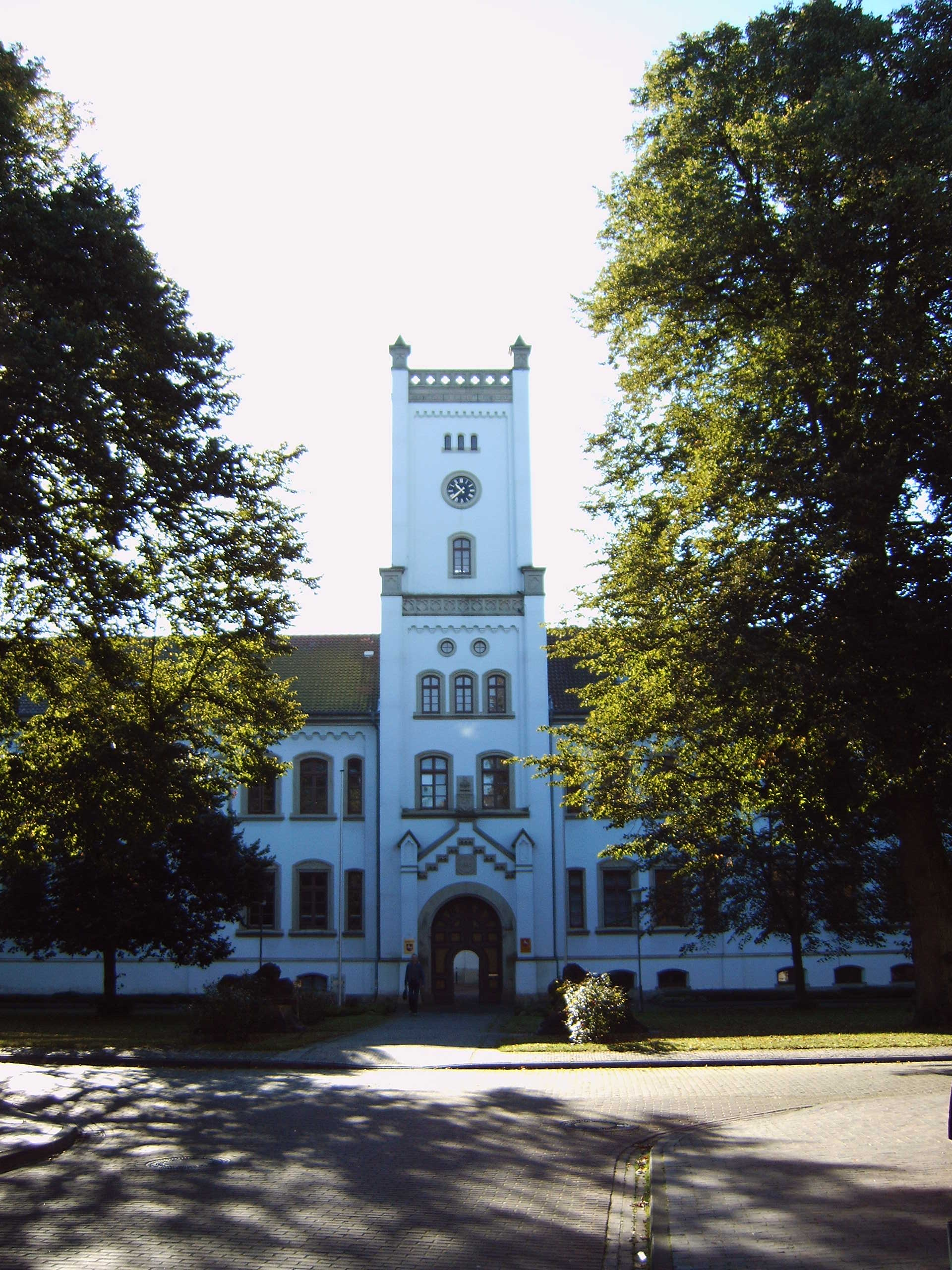 Landgericht Aurich, Bild aufgenommen am 4.10.2005 von Olaf Meister